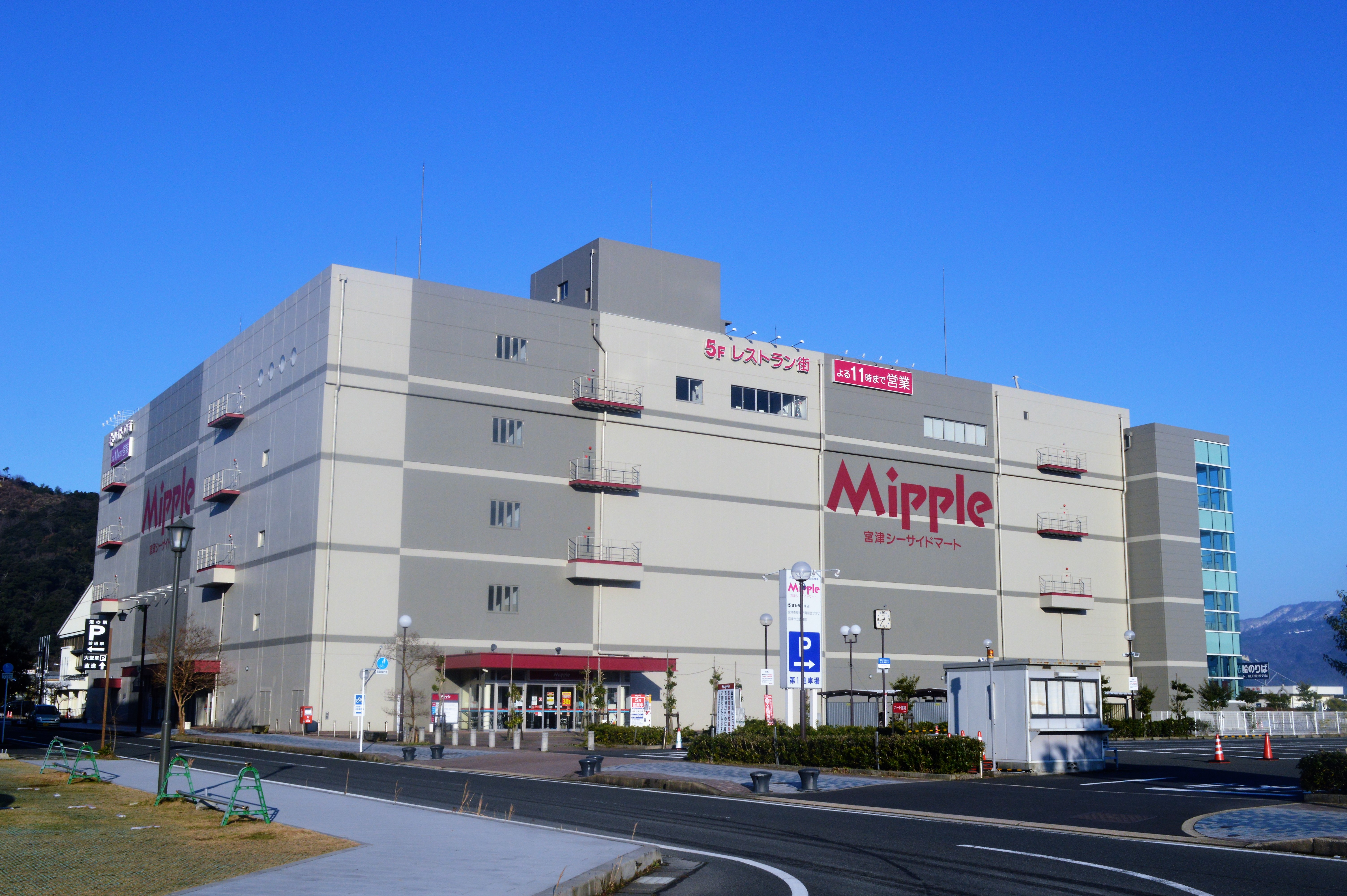 京都府宮津市にある複合商業施設「宮津シーサイドマートミップル」。宮津市立図書館などが入っている。